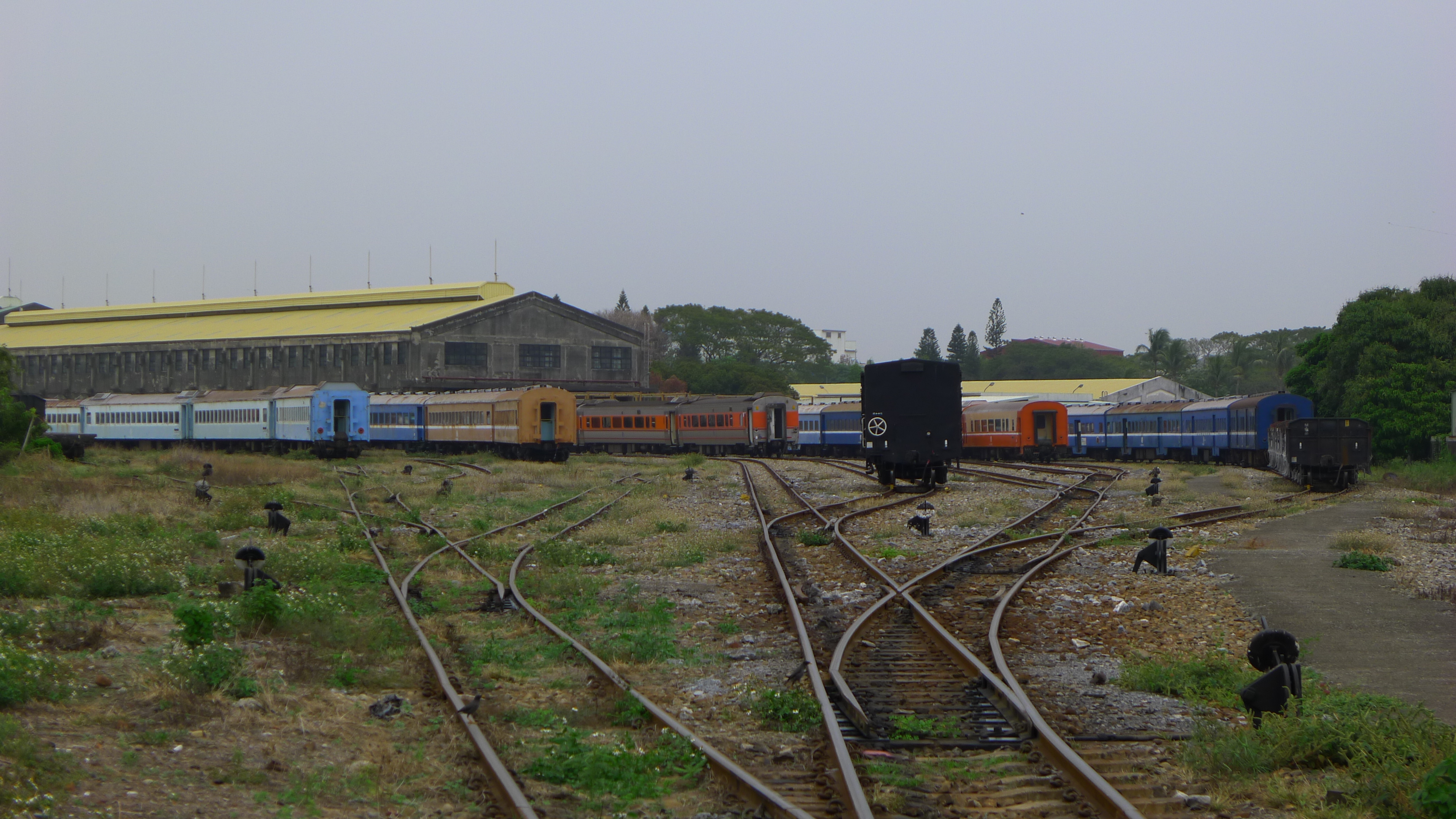 台灣鐵路管理局高雄機廠